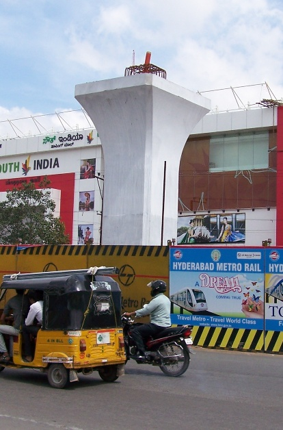 ಕನ್ನಡ: ಮೆಟ್ರೋ ಕಾಮಗಾರಿ ಕುಕ್ಕಟಪಲ್ಲಿಯಲ್ಲಿ ಕಂಡಂತೆ